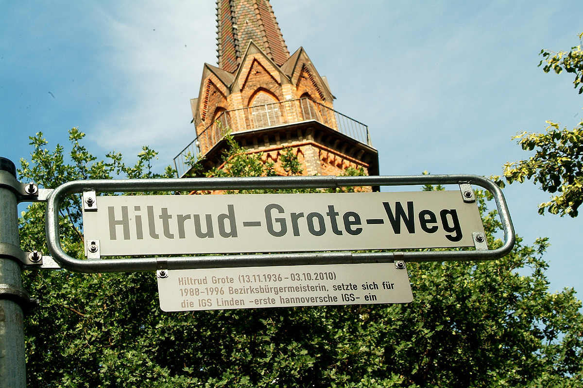 Der Hiltrud-Grote-Weg in Hannover Linden; Hiltrud Grote (geboren 13. November 1933, gestorben 3. Oktober 2010) war Bezirksbürgermeisterin in Linden und setzte sich für den Bau und die Einrichtung der IGS Linden ein, die erste hannoversche IGS ...